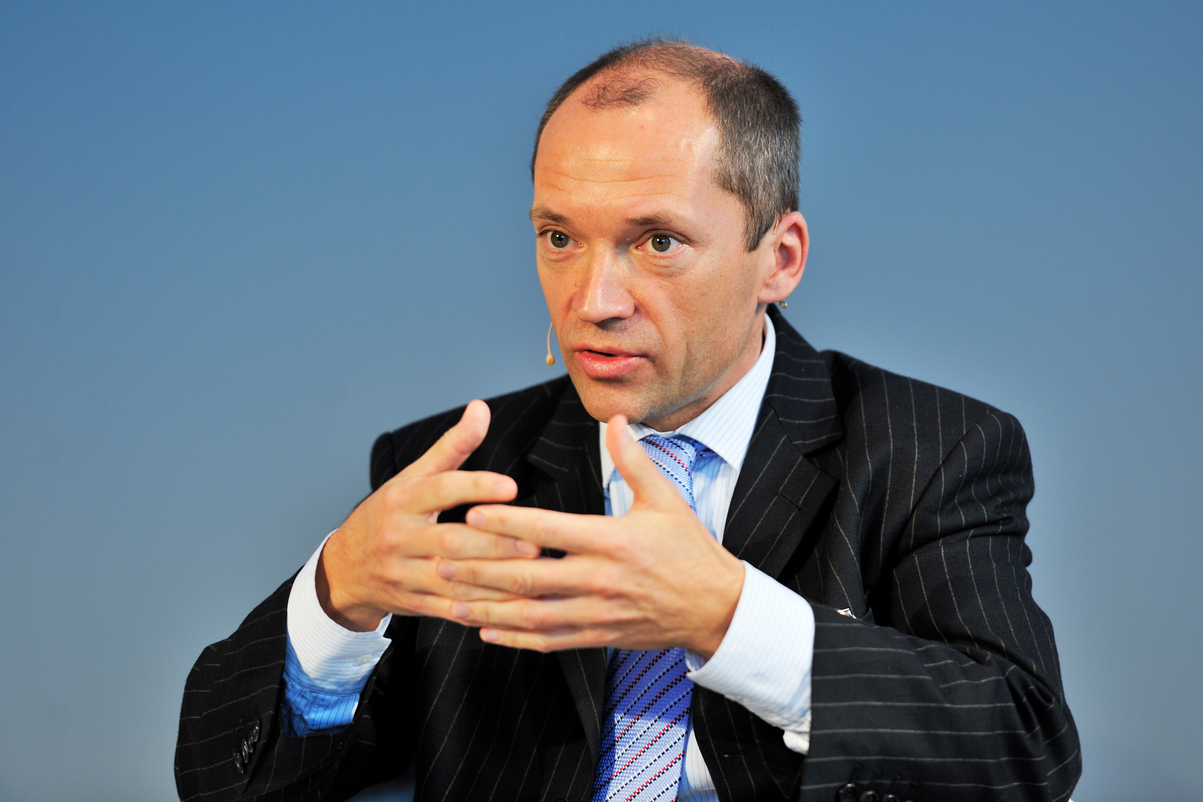 Martin Hrabĕ de Angelis auf einem Kongress 2010